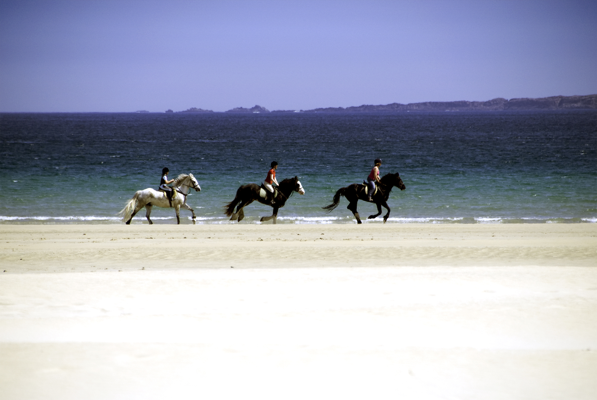 Donegal beaches